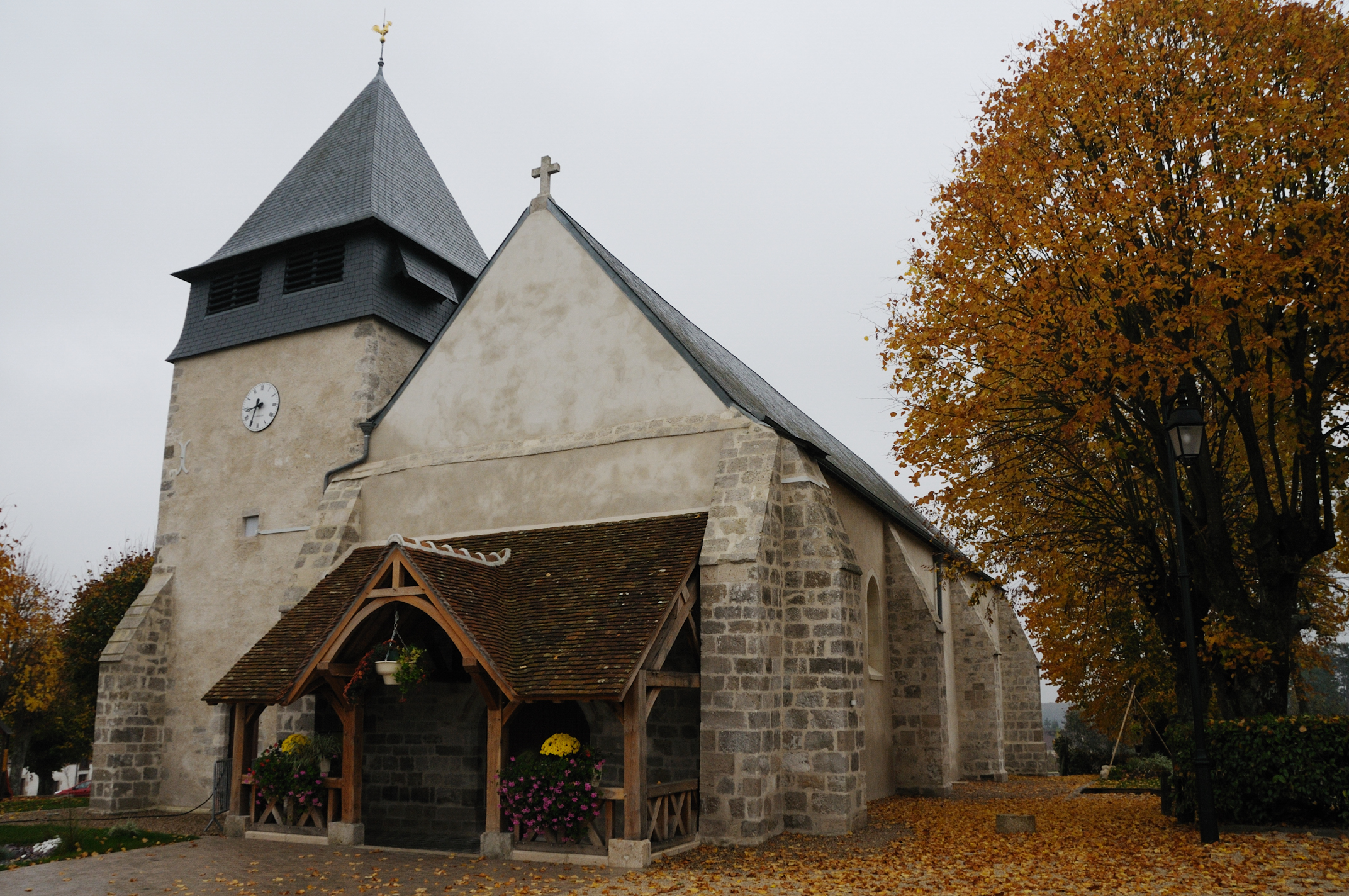 Église Saint-Saturnin, Marigny-les-Usages, Loiret, France